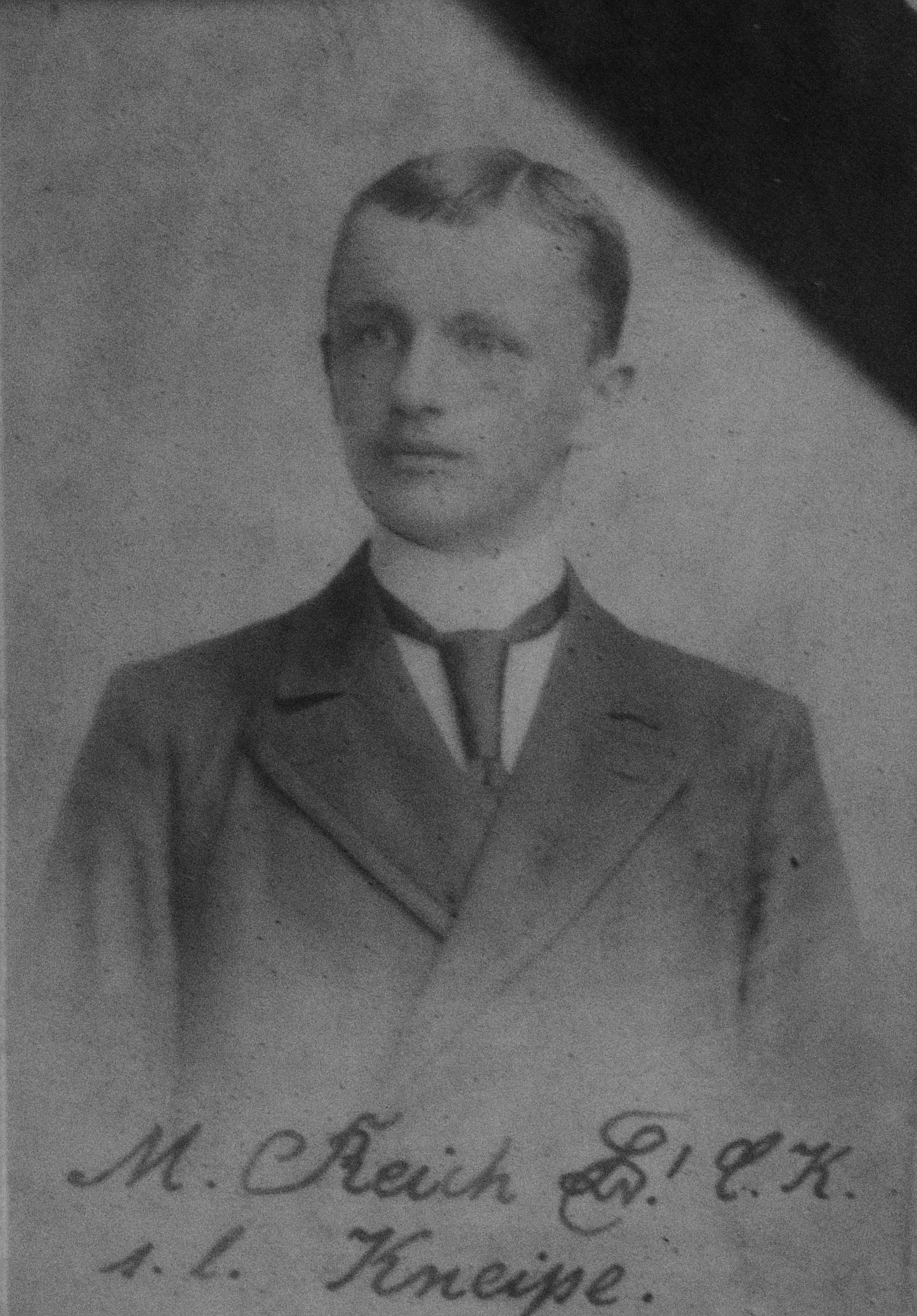 Fotografie von Max Reich als Mitglied der Studentenverbindung Leonensia. Unten befindet sich der Zirkel der Verbindung Leonensia. Standort der Fotografie: Ahnengalerie im Conventssaal der Verbindung Leonensia